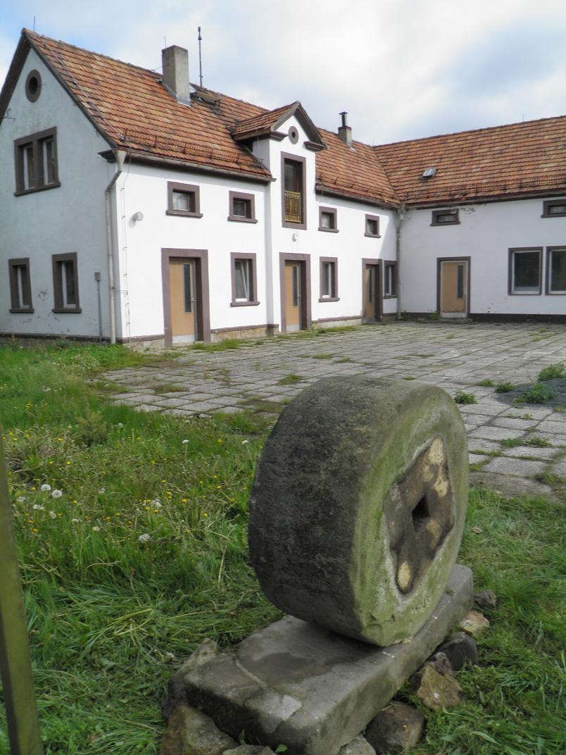 Mühlstein aus Grillenburger Sandstein in Grillenburg